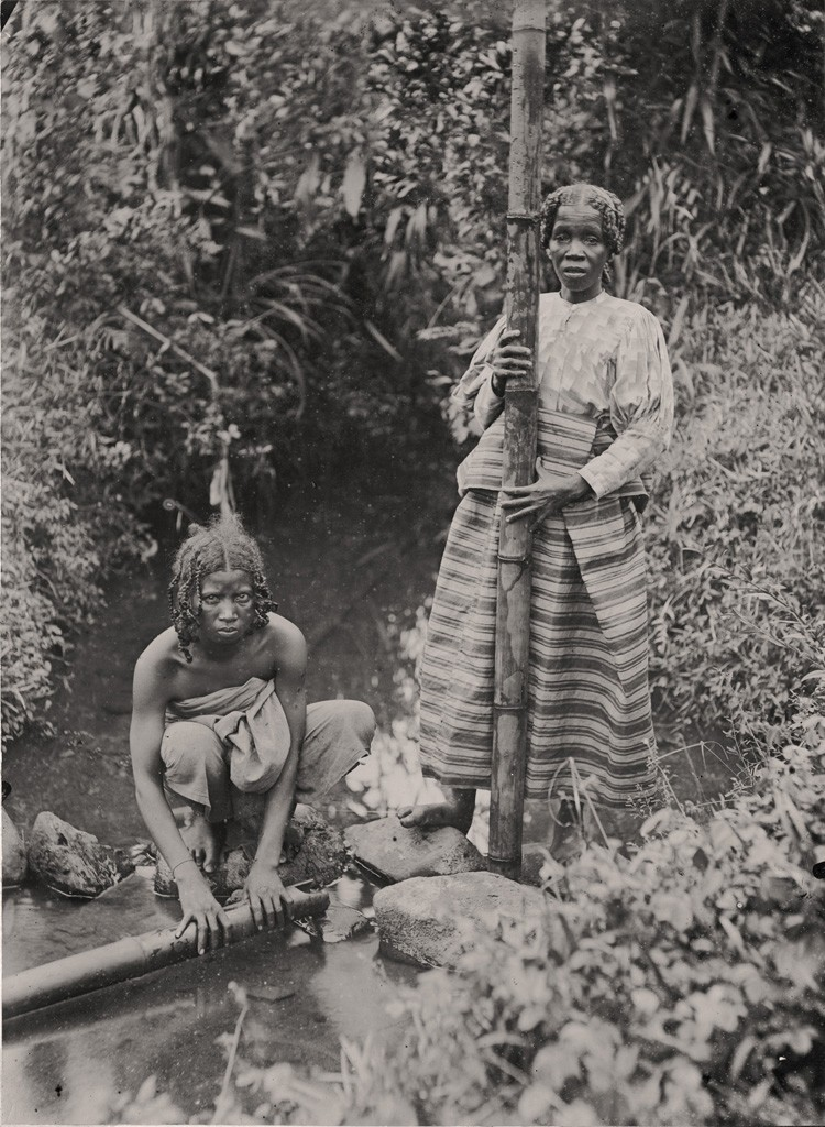 Femmes Betsimisarakas puisant de l'eau, 1900/1910.